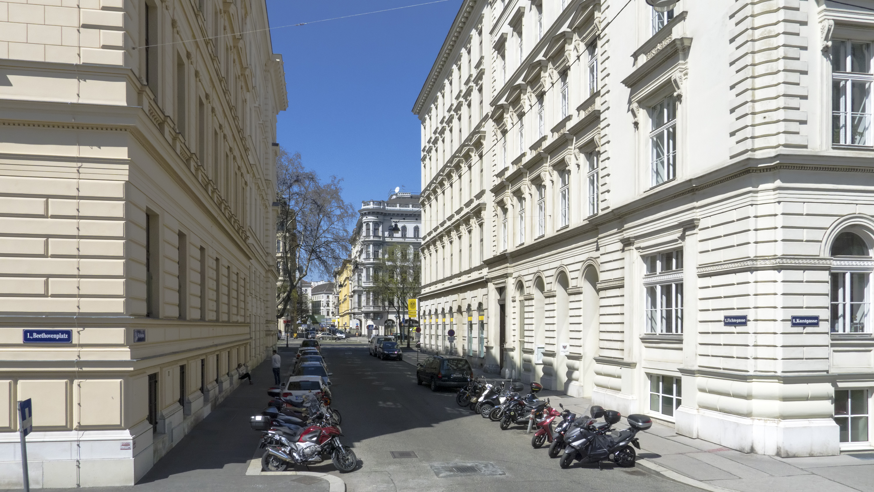 Fichtegasse in Wien 1 bei Nr. 12 Richtung Nordwesten